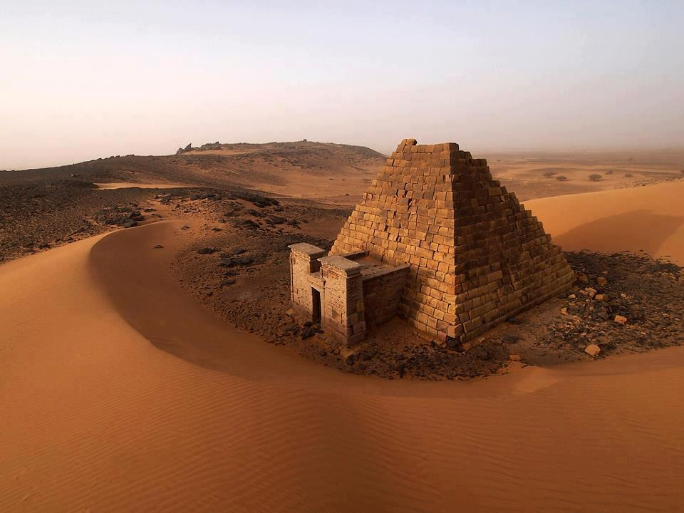 أحد أهرام مروي منطقة المصورات